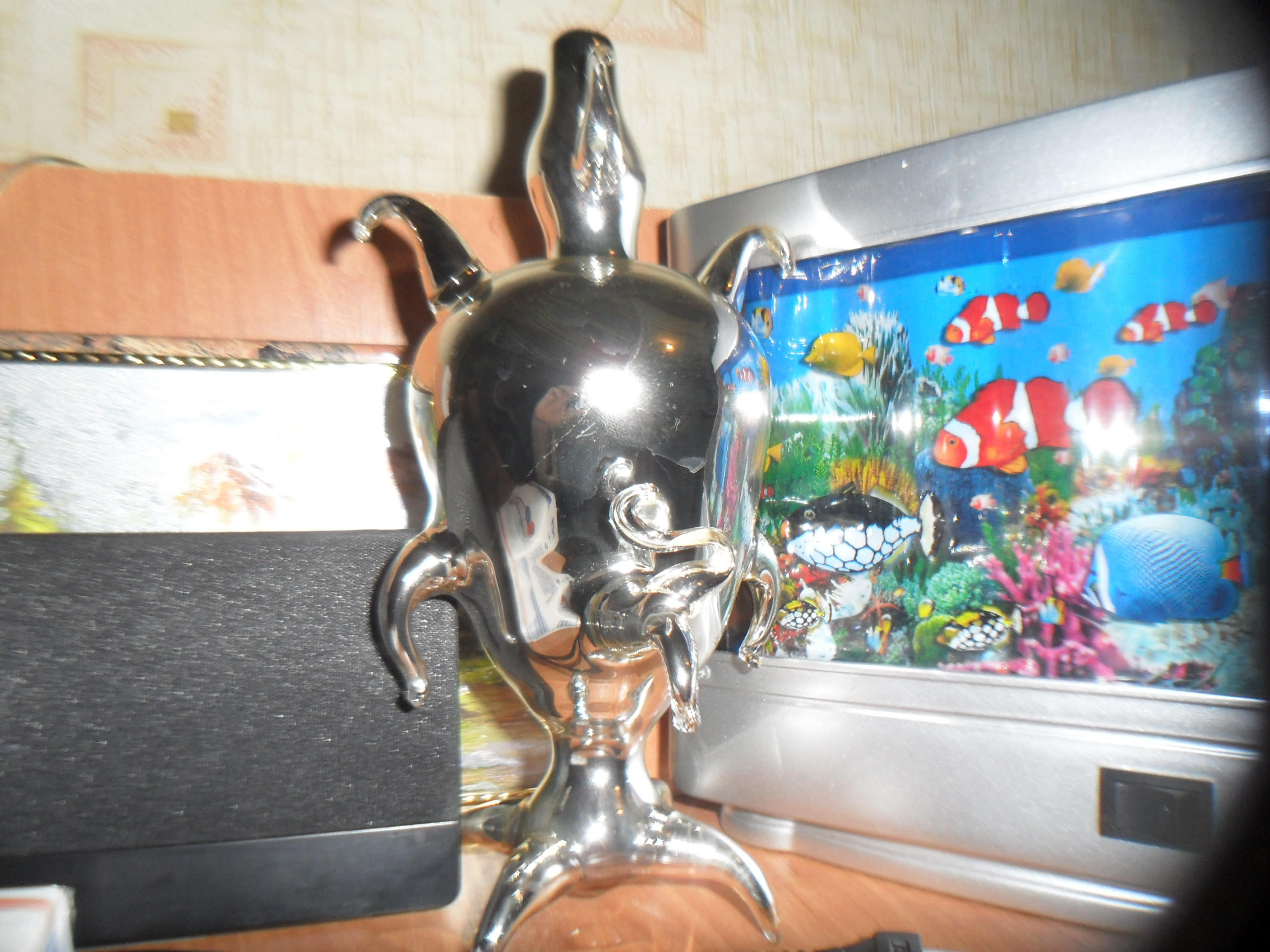 Сувенирный самовар. Отлит на ламповом заводе г. Воронеж. Год выпуска неизвестен.